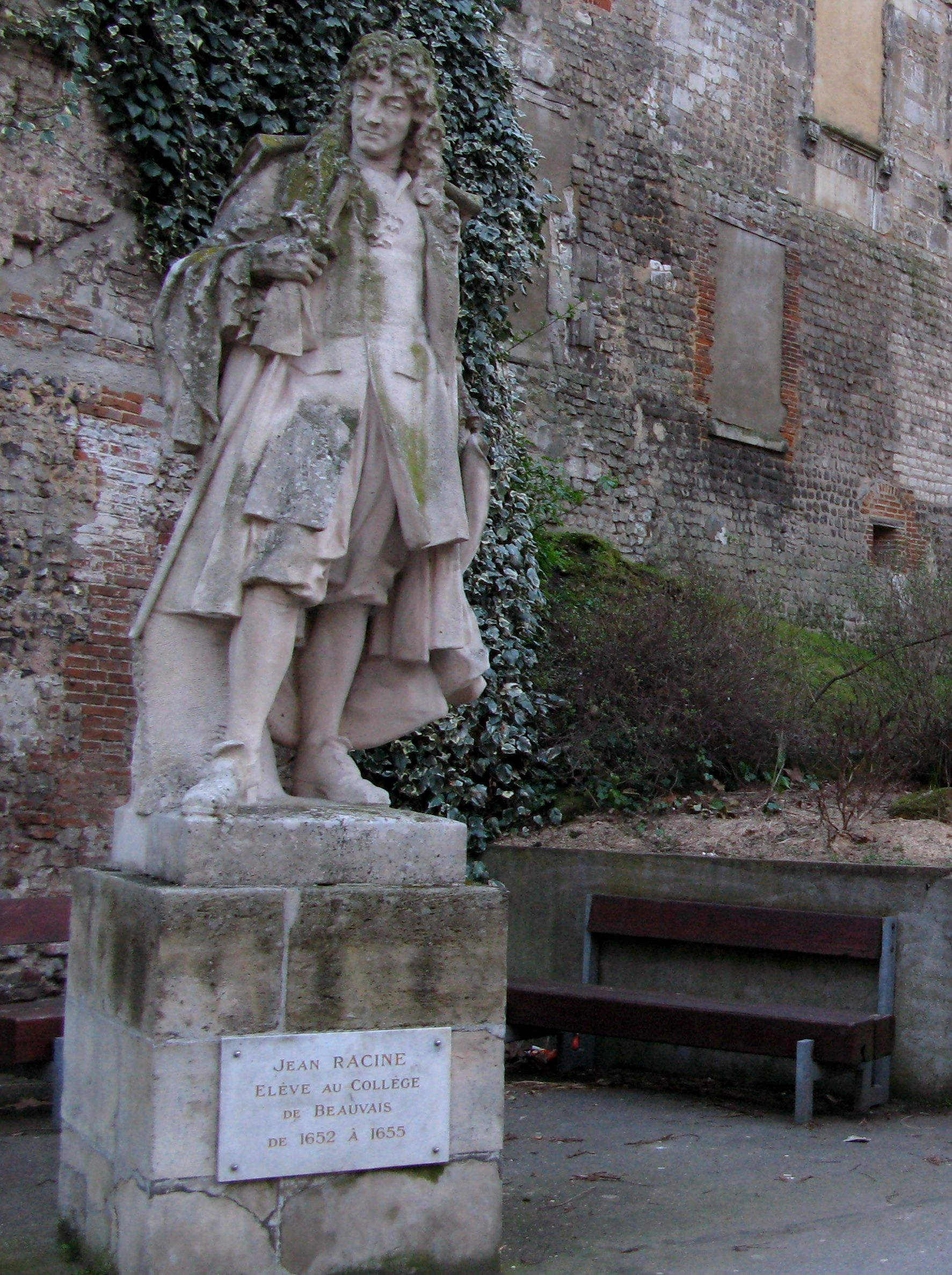 Beauvais (Oise, France) - Statue de Jean Racine devant les remparts.